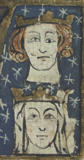 EDuard I. a Eleonora Kastilská